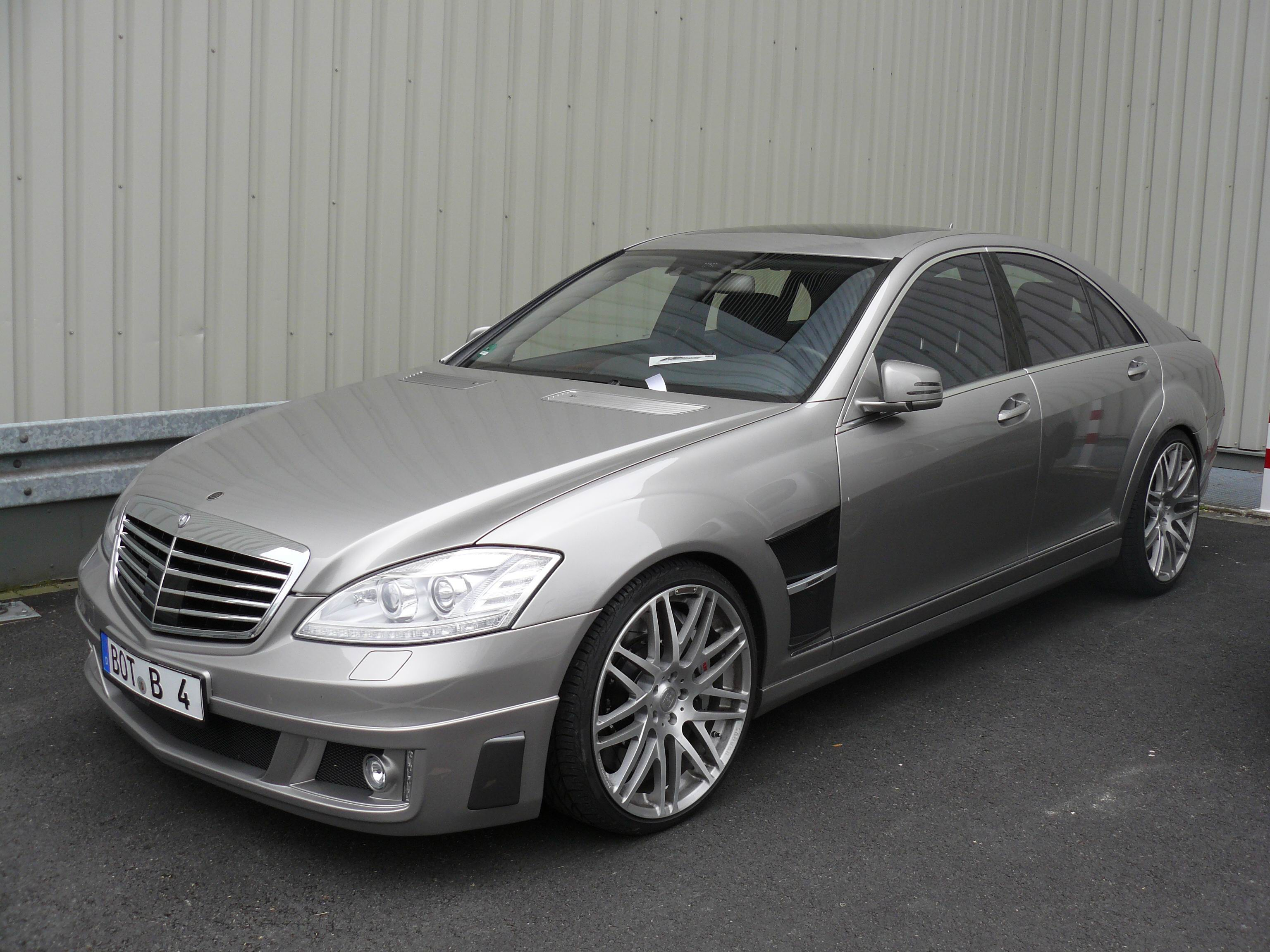 Essen 2011